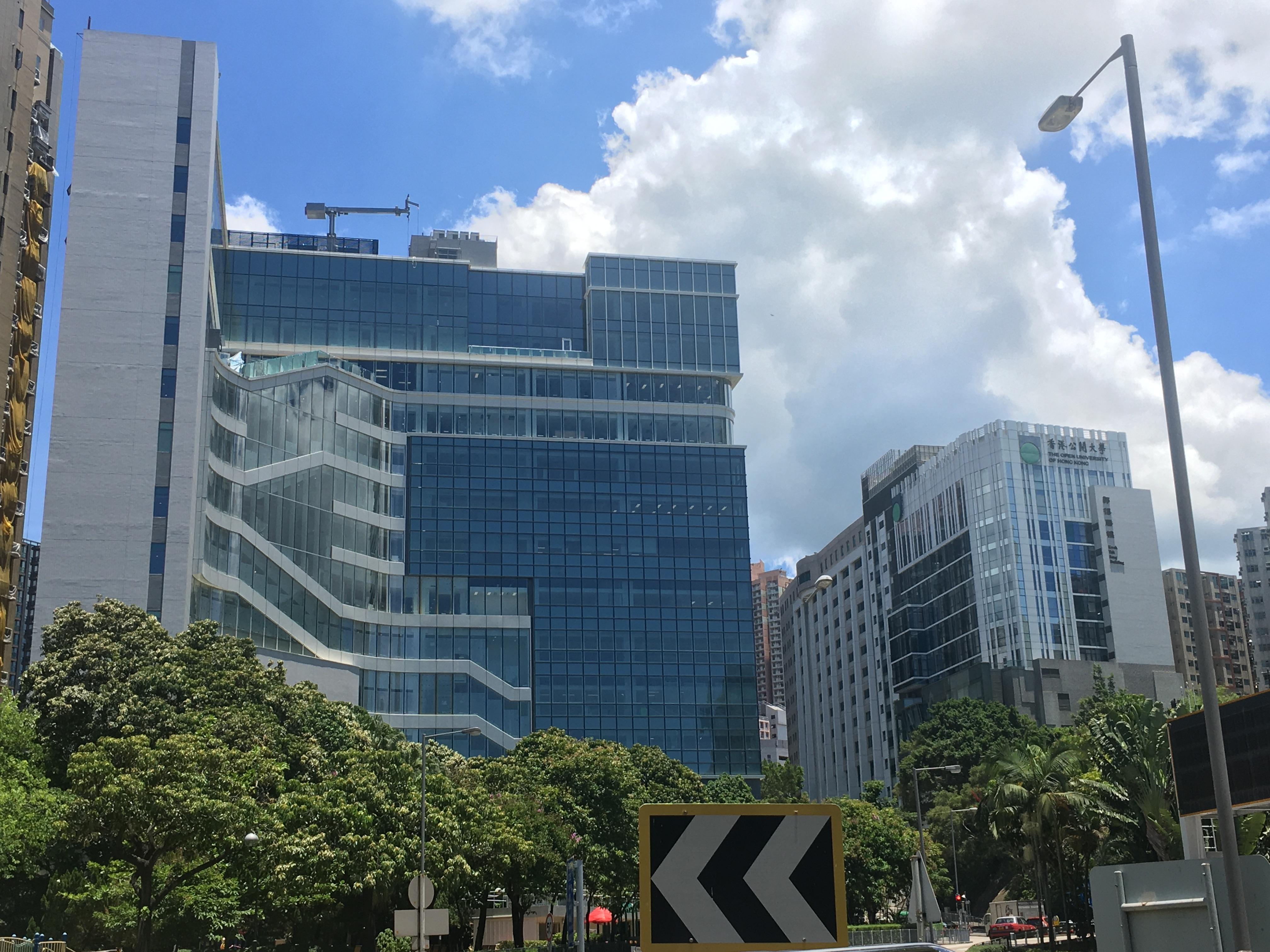 中文（台灣）: 香港公開大學賽馬會健康護理學院